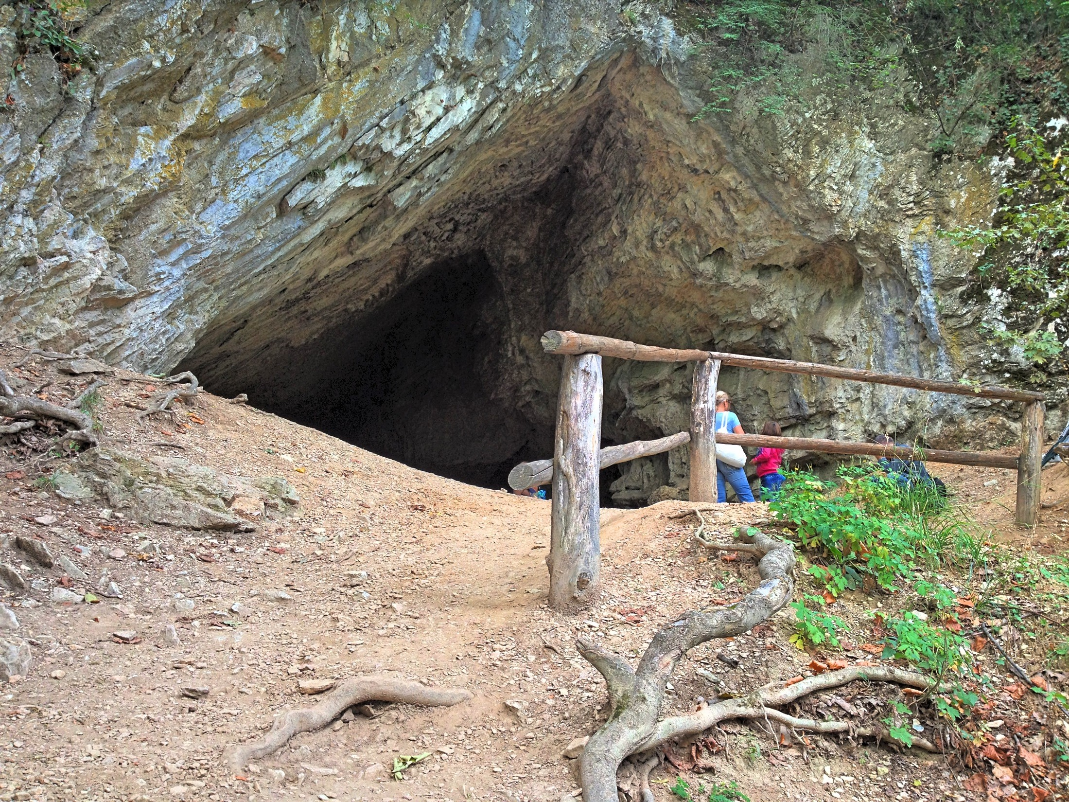 Szilvásvárad, Istállós-kői-barlang